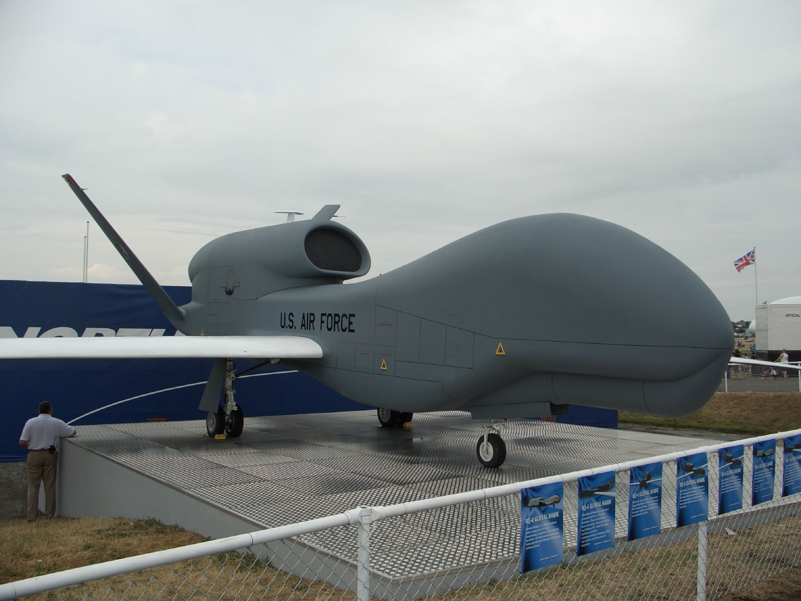 A mean-looking bugger, isn't it?